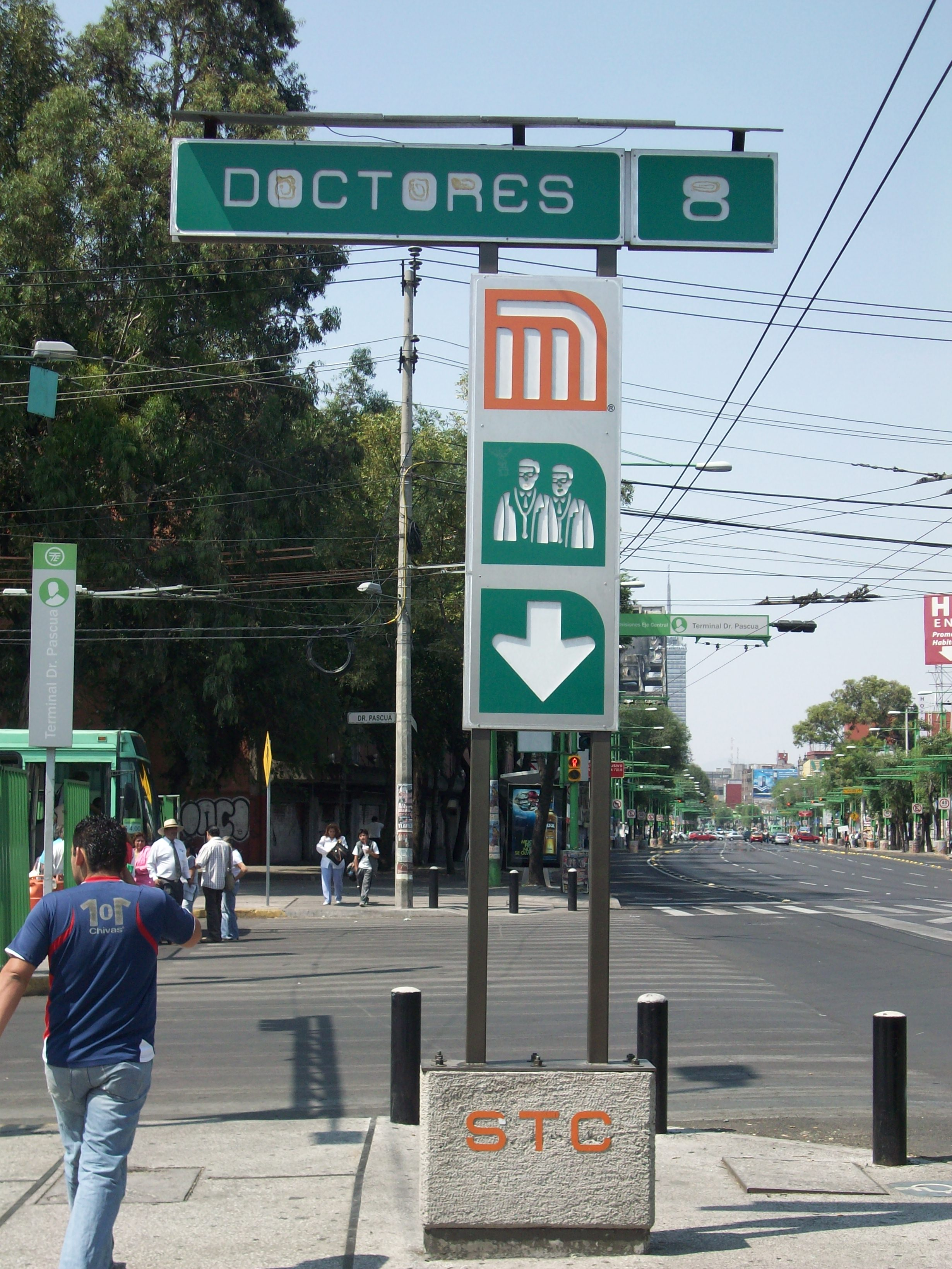 Letrero estacion Doctores